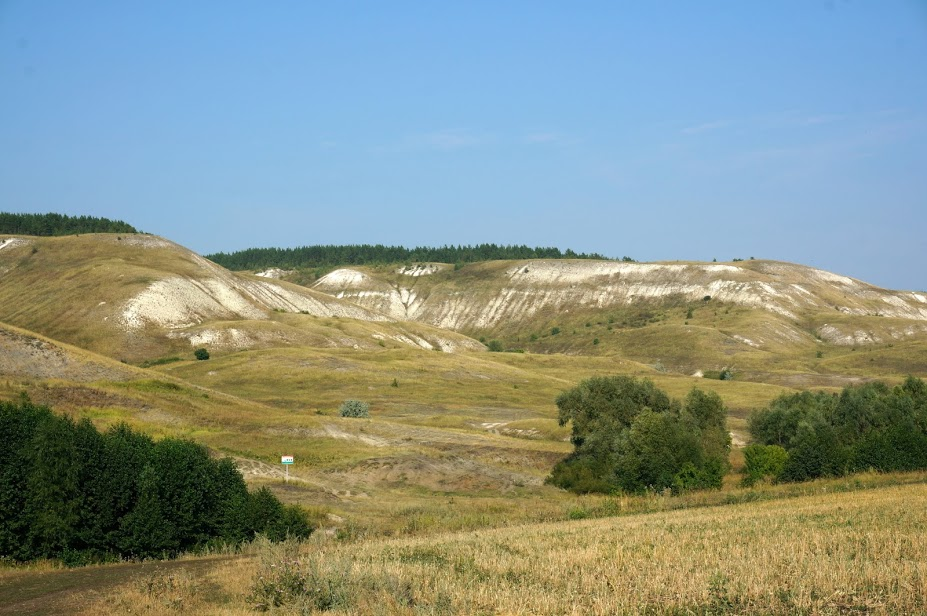 Памятник природы "Подвальские террасы"